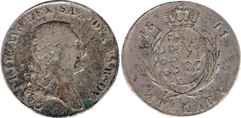 Jedna trzecia talara 1811 galazki jak 1810